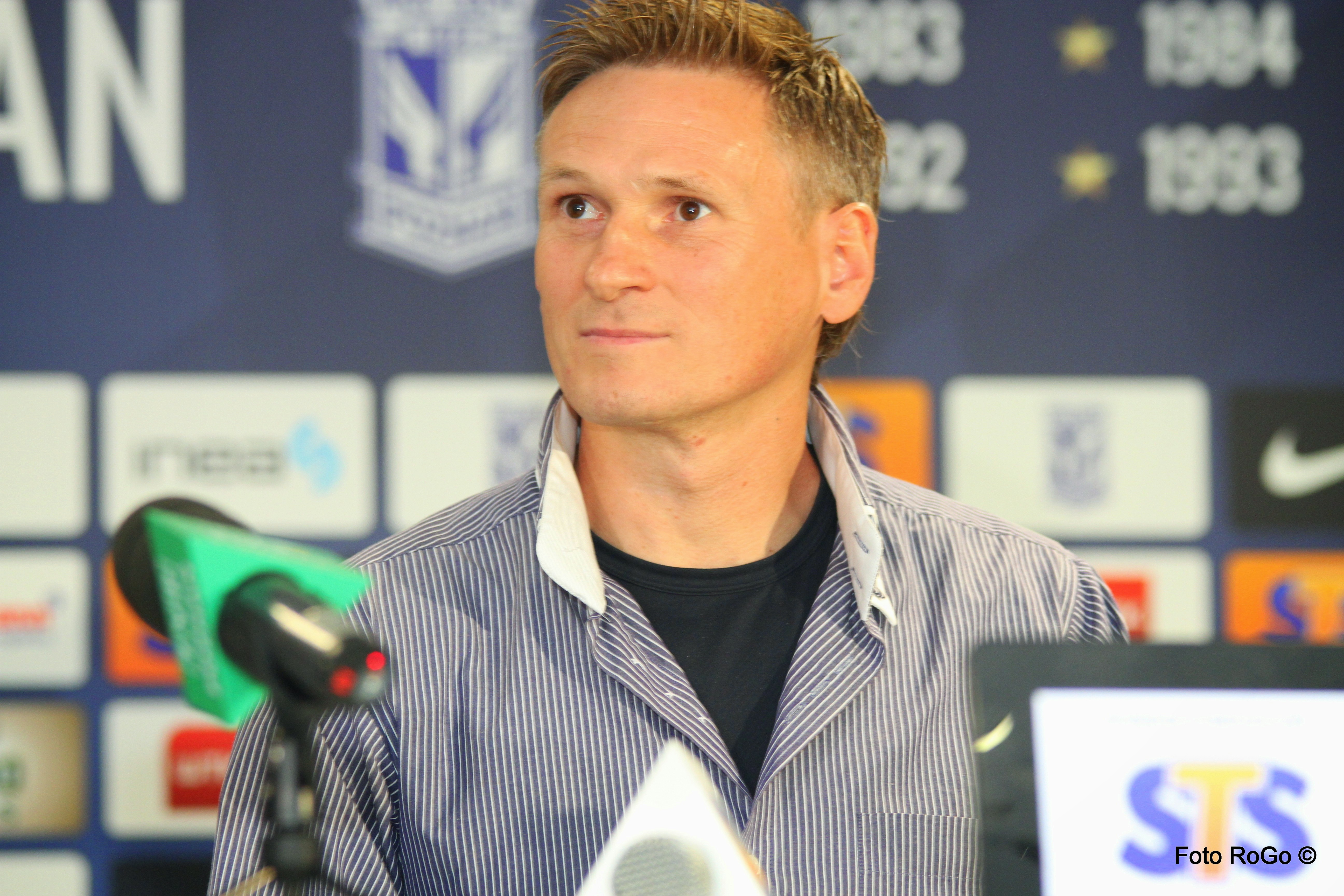 Andrzej Krzyształowicz, trener bramkarzy Lecha Poznań